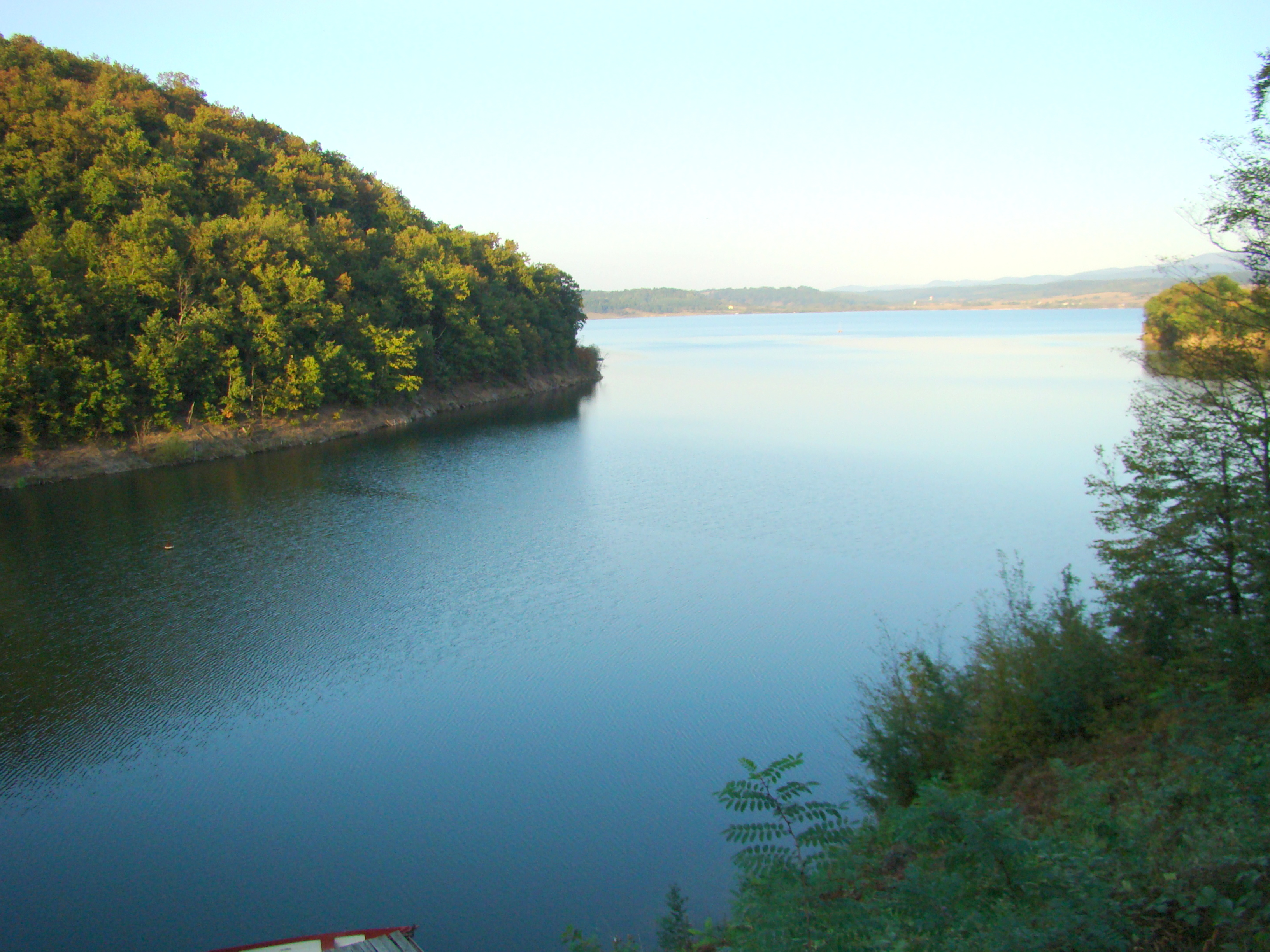 Lacul de acumulare Surduc